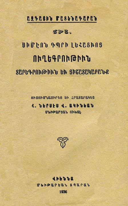 Обложка издания «Путевых заметок» армянского автора Симеона Лехаци